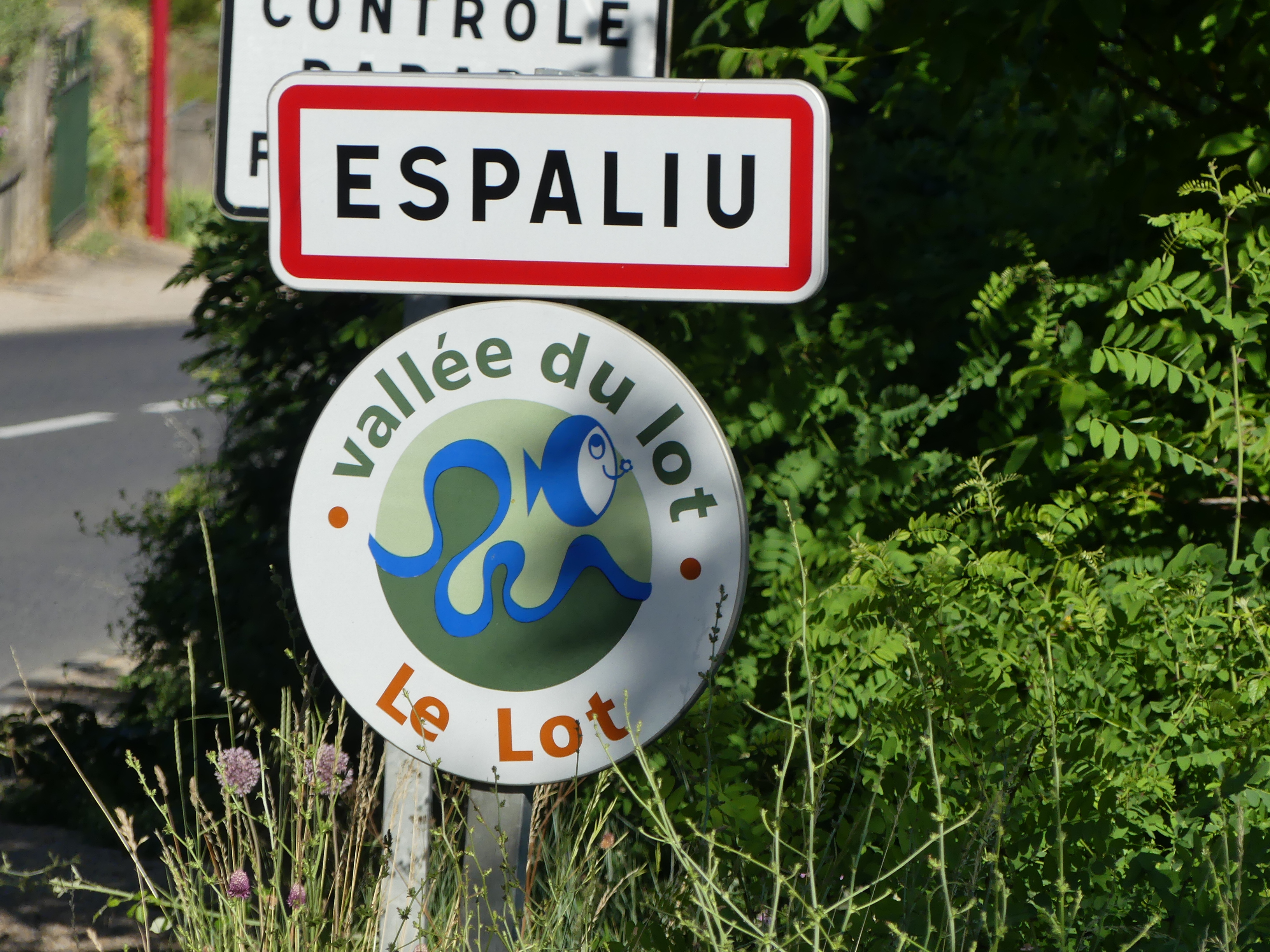 Panneau en occitan d'entrée à Espalion, Aveyron, France.